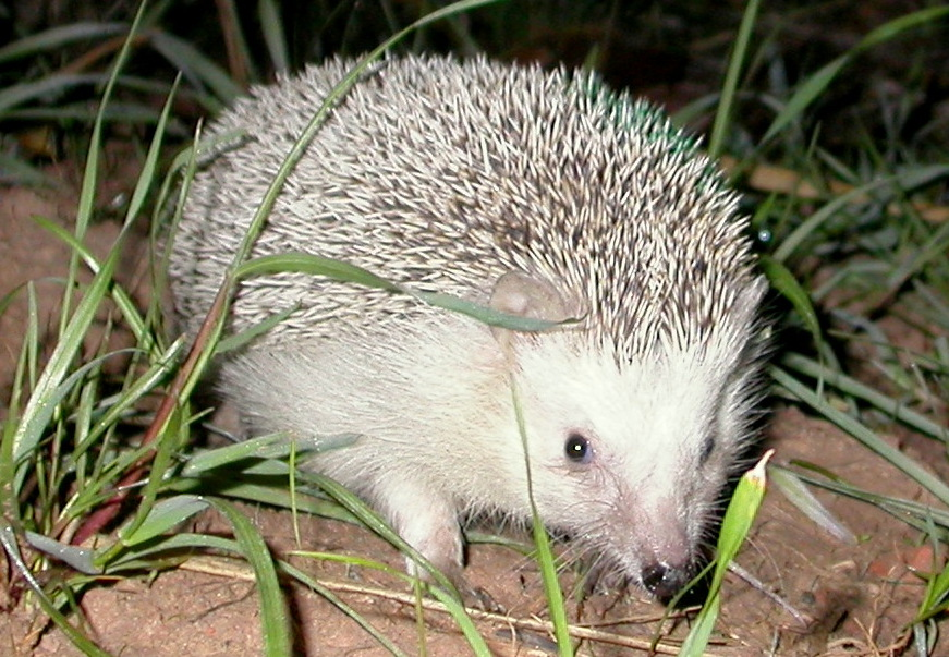 Erizo liberado en el marco del proyecto de seguimiento de la especie en el Parc Agrari del Baix Llobregat